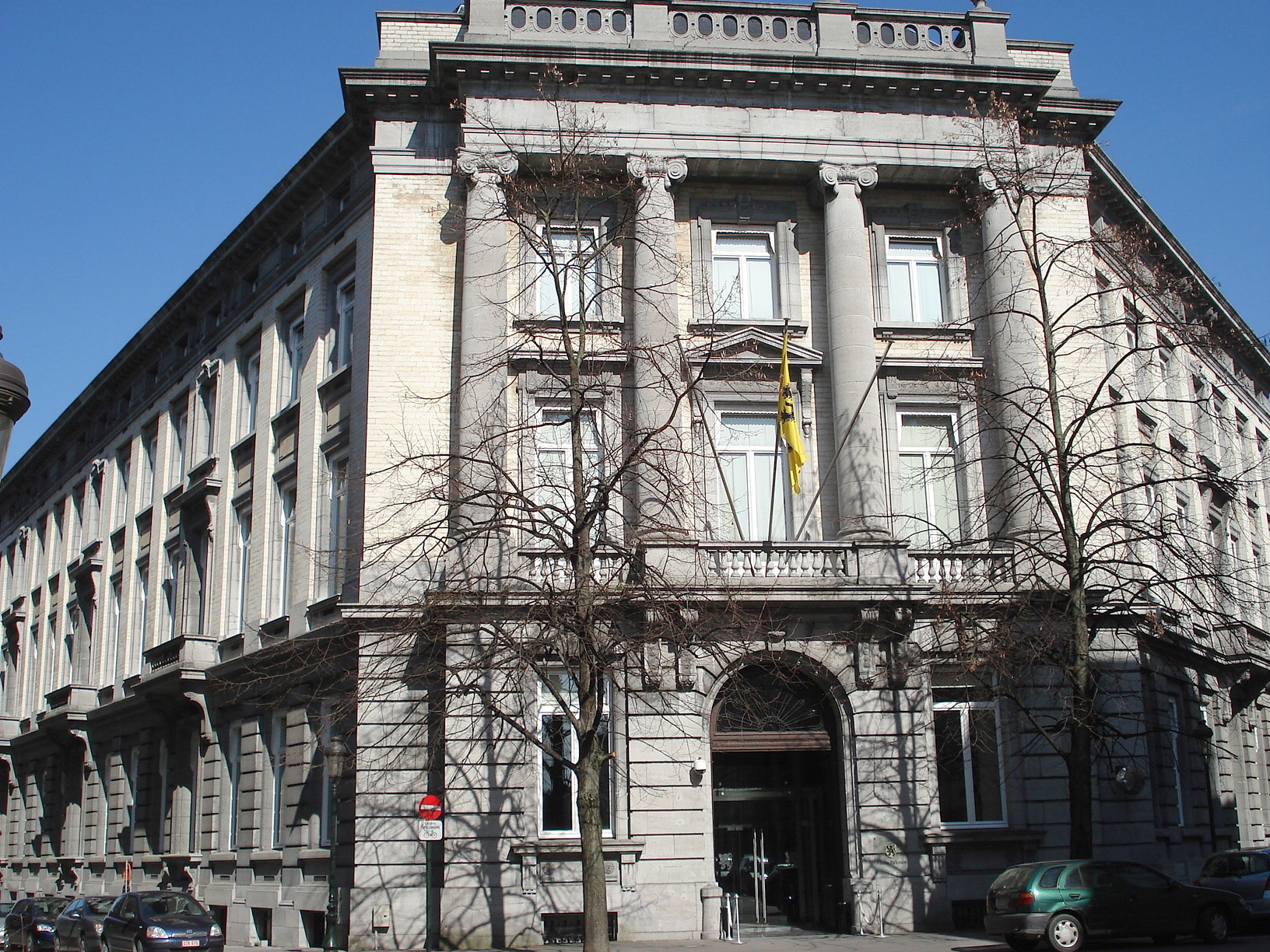 Péristyle du Parlement flamand, à l'angle de la rue Ducale (à gauche) et de la rue de la Presse (à droite), à Bruxelles (Belgique). Anciennement Hôtel des Postes et de la Marine (1905, arch. Joseph Benoît), siège du Parlement flamand depuis 1987, après divers aménagements, dont la construction d'une verrière au-dessus de la cour intérieure pour y abriter un hémicycle.